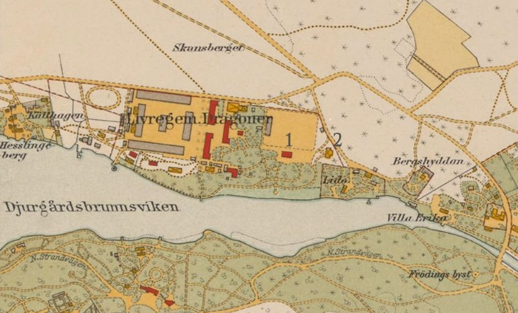 Detaljerad karta över Stockholm med omnejd. Upprättad mellan 1917 och 1934. Del som visar Dragoners Livregementets kaserner vid Djurgårdsbrunnsviken omkring 1920.1 Dragongården2 Annexet